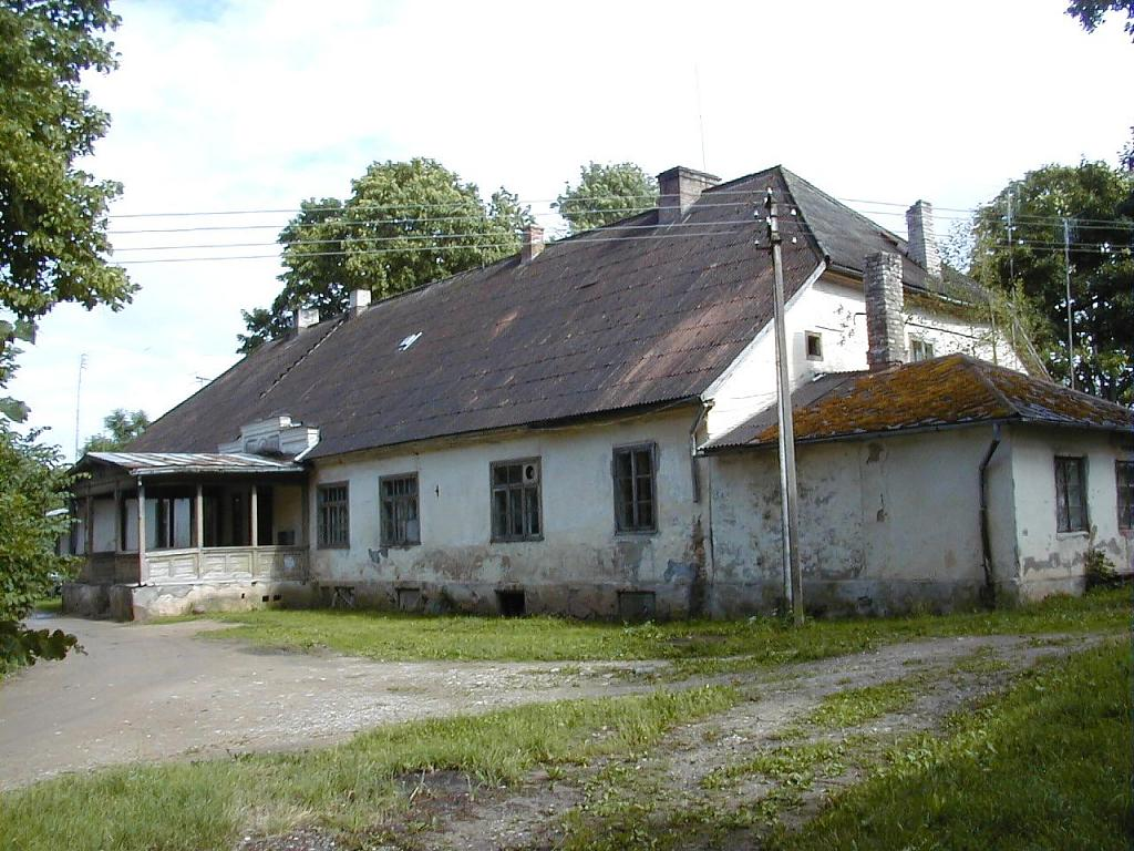 Iģenes muiža 2002-06-24